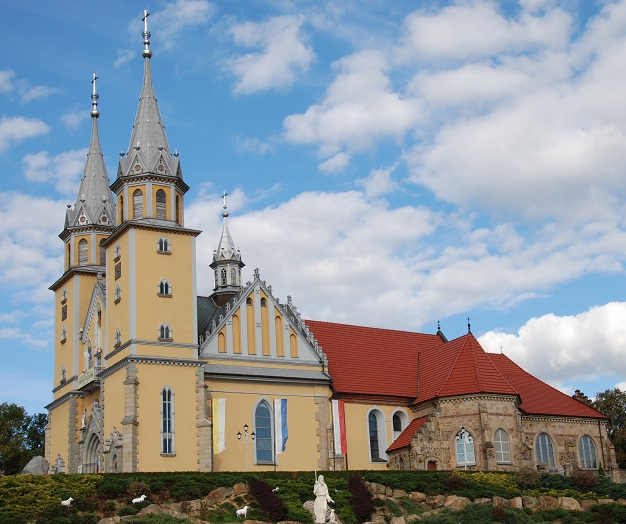 Trzciana - kościół parafialny p.w. św. Małgorzaty, koniec XV w., 1857 (zabytek nr A-172)